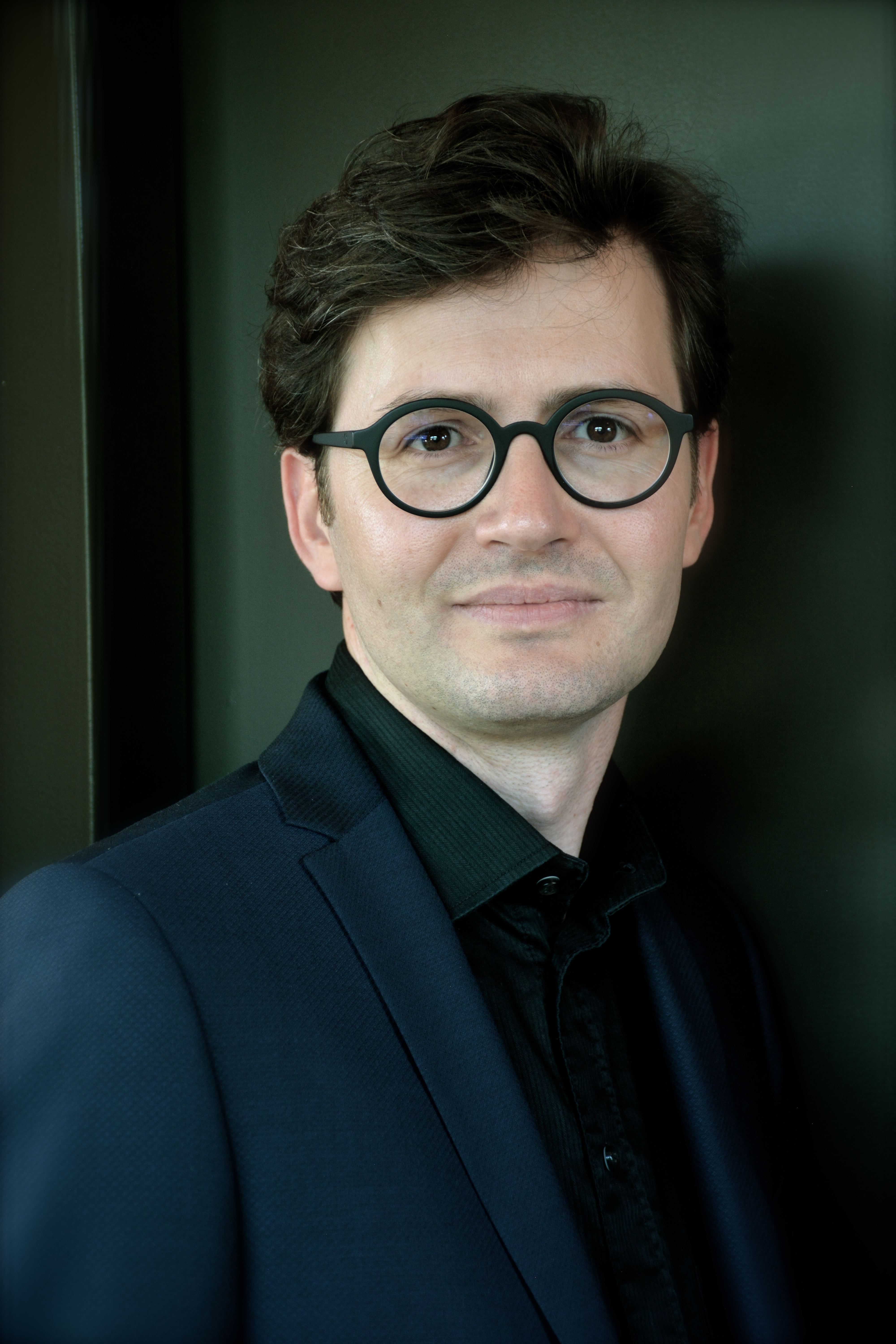 Conductor